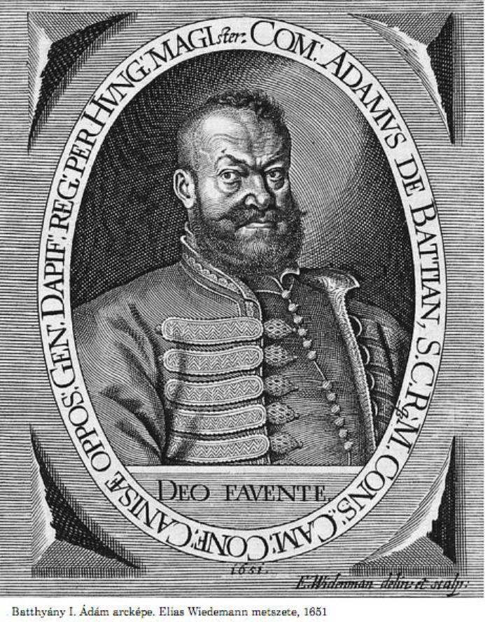 Batthyány I. Ádám arcképe. Elias Wiedemann metszete, 1651